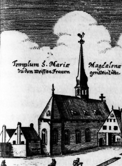 Köln-J1227bis 1802. Kloster zu den weißen Frauen am Blaubach